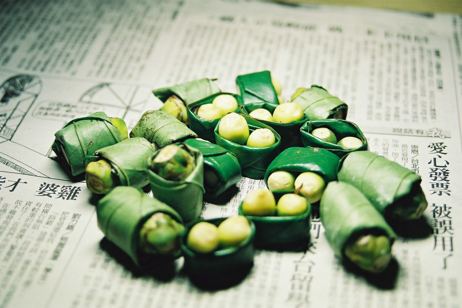 台湾で売っている檳榔。